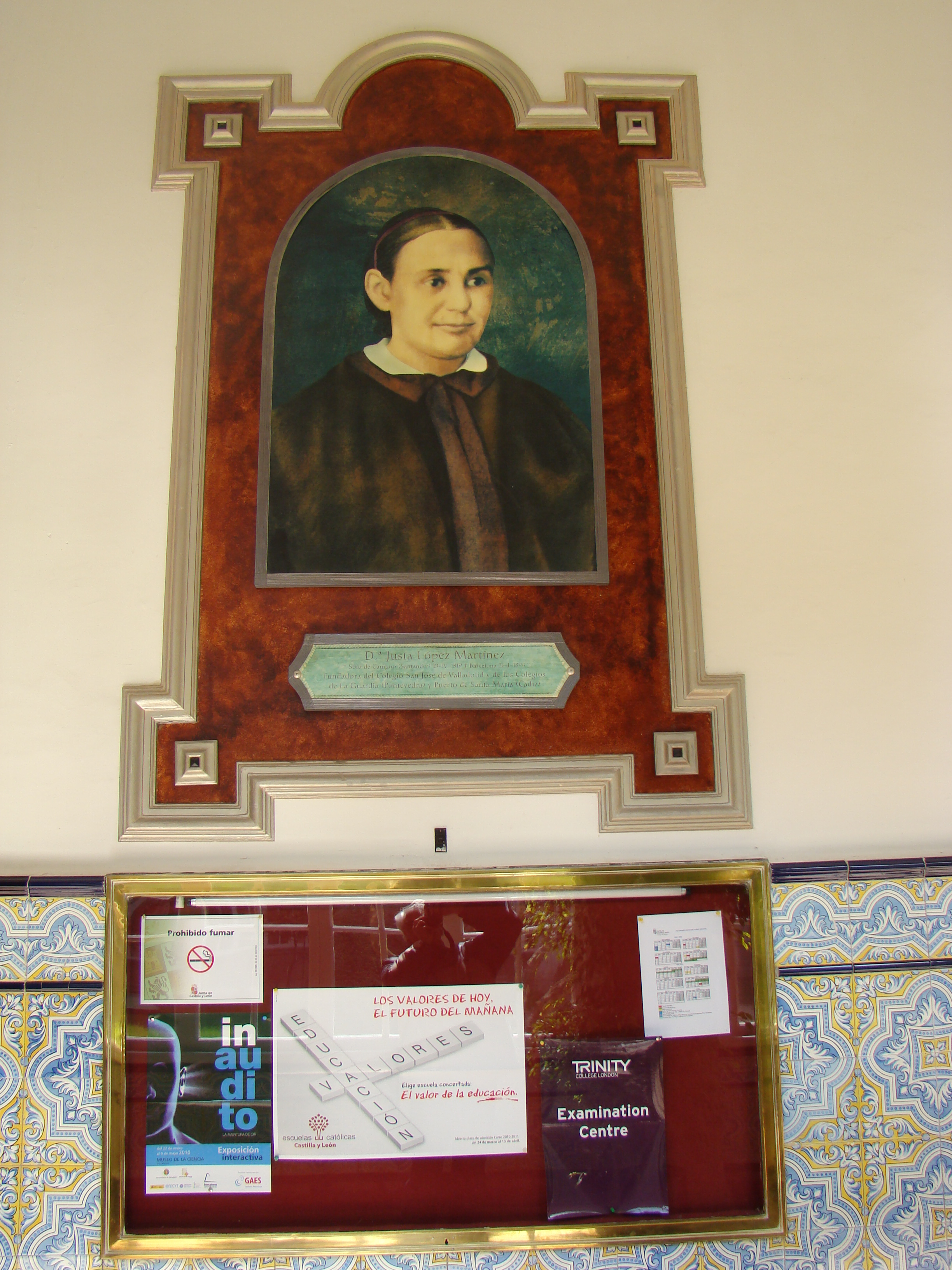 Colegio de San José en Valladolid (España). Retrato de Justa López Martínez, mecenas y protectora del colegio.